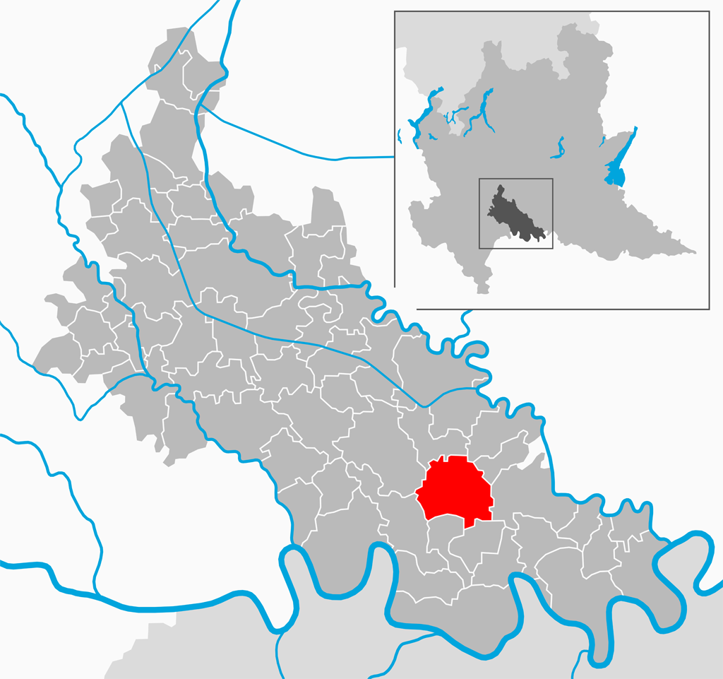 Il comune di Codogno nella provincia di Lodi